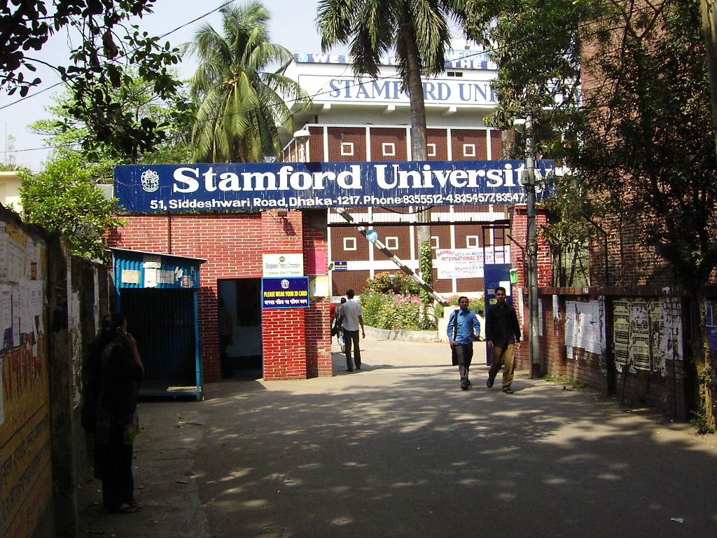 Entrance to STU campus